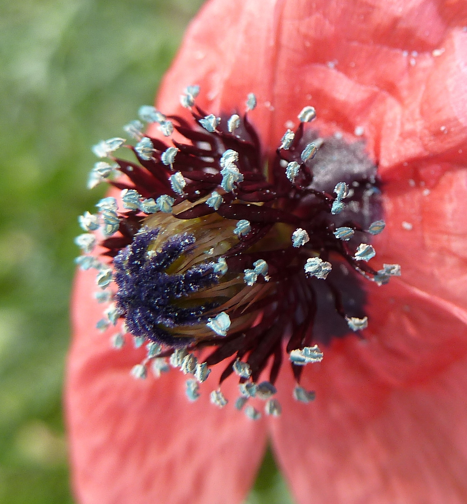 Papaver hybridum (Amapola triste) - Flor: detalle de los órganos reproductores (estambres numerosos, ovario con estigmas radiales múltiples ) - Camino de la Azarbe de Patricio, Albatera (Alicante, España)